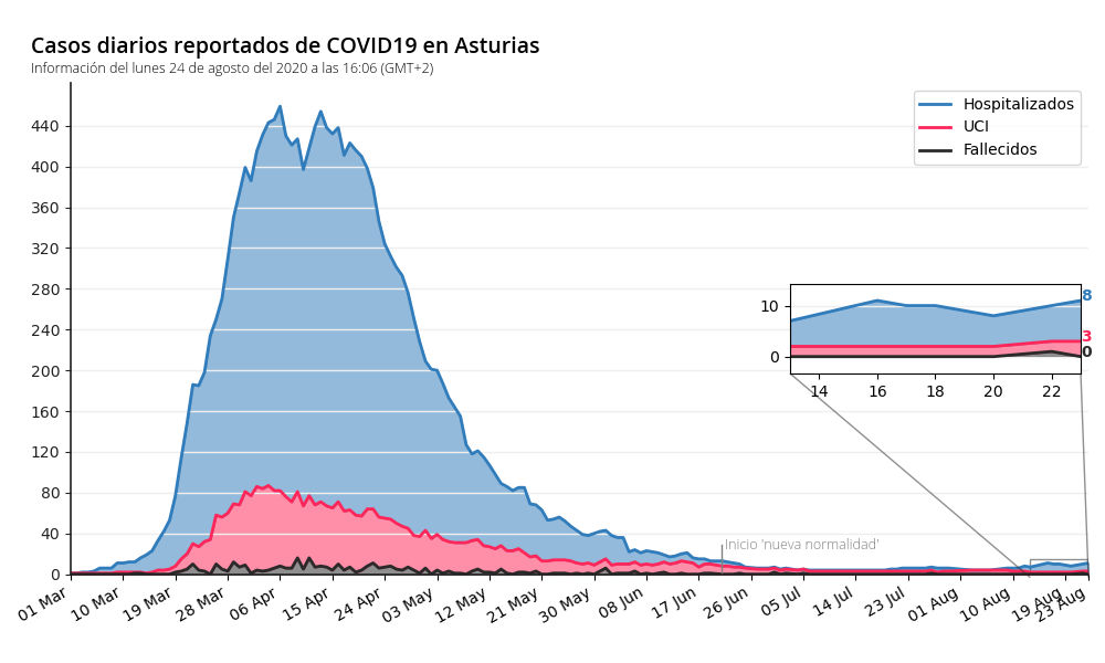 Casos diarios reportados por la Consejería de Salud de Asturias hasta el 24 de agosto de 2020 sobre la enfermedad COVID-19. Los datos proceden de las notas de prensa diarias del Gobierno de Asturias.